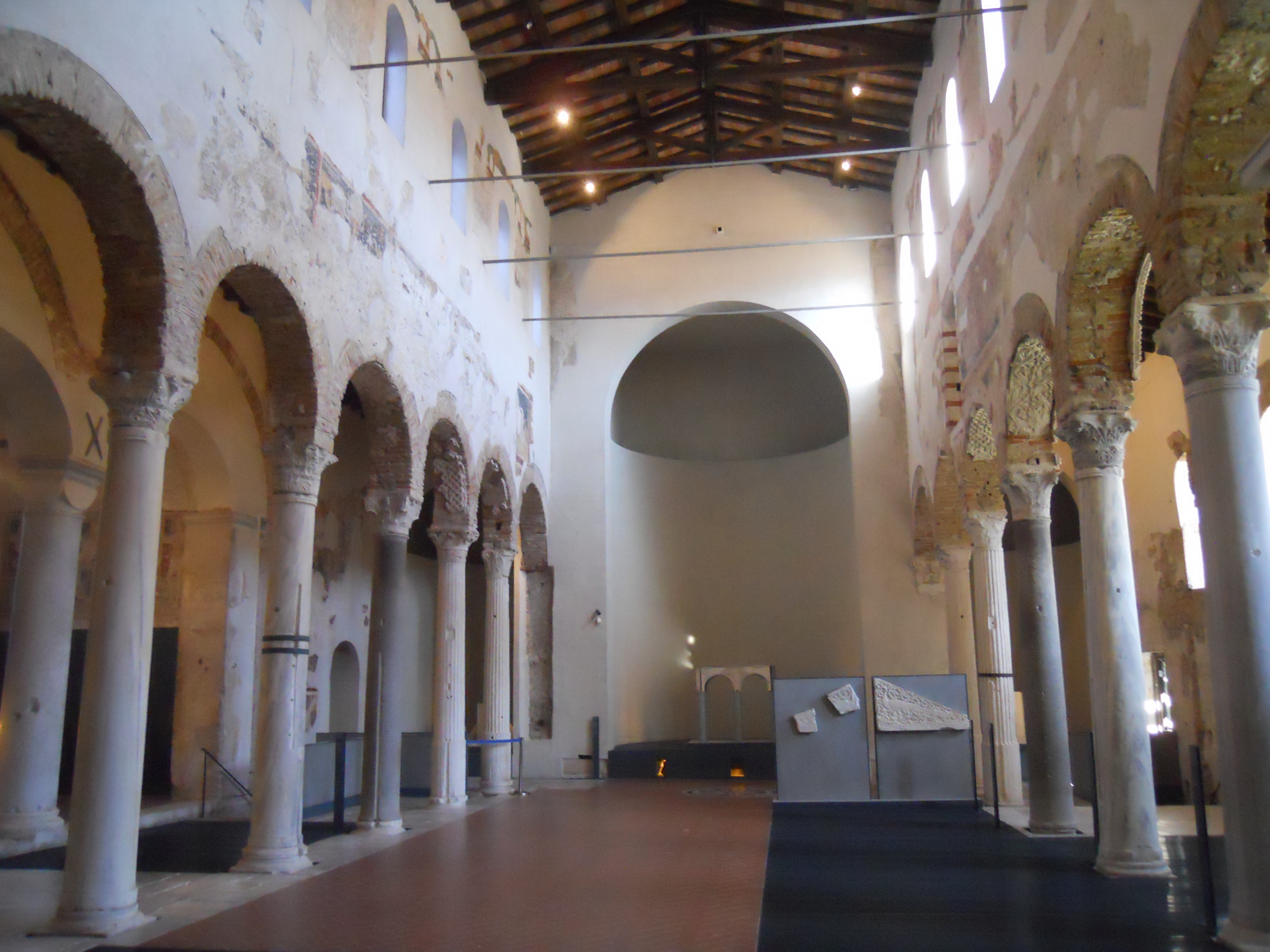 san salvatore (brescia) interno